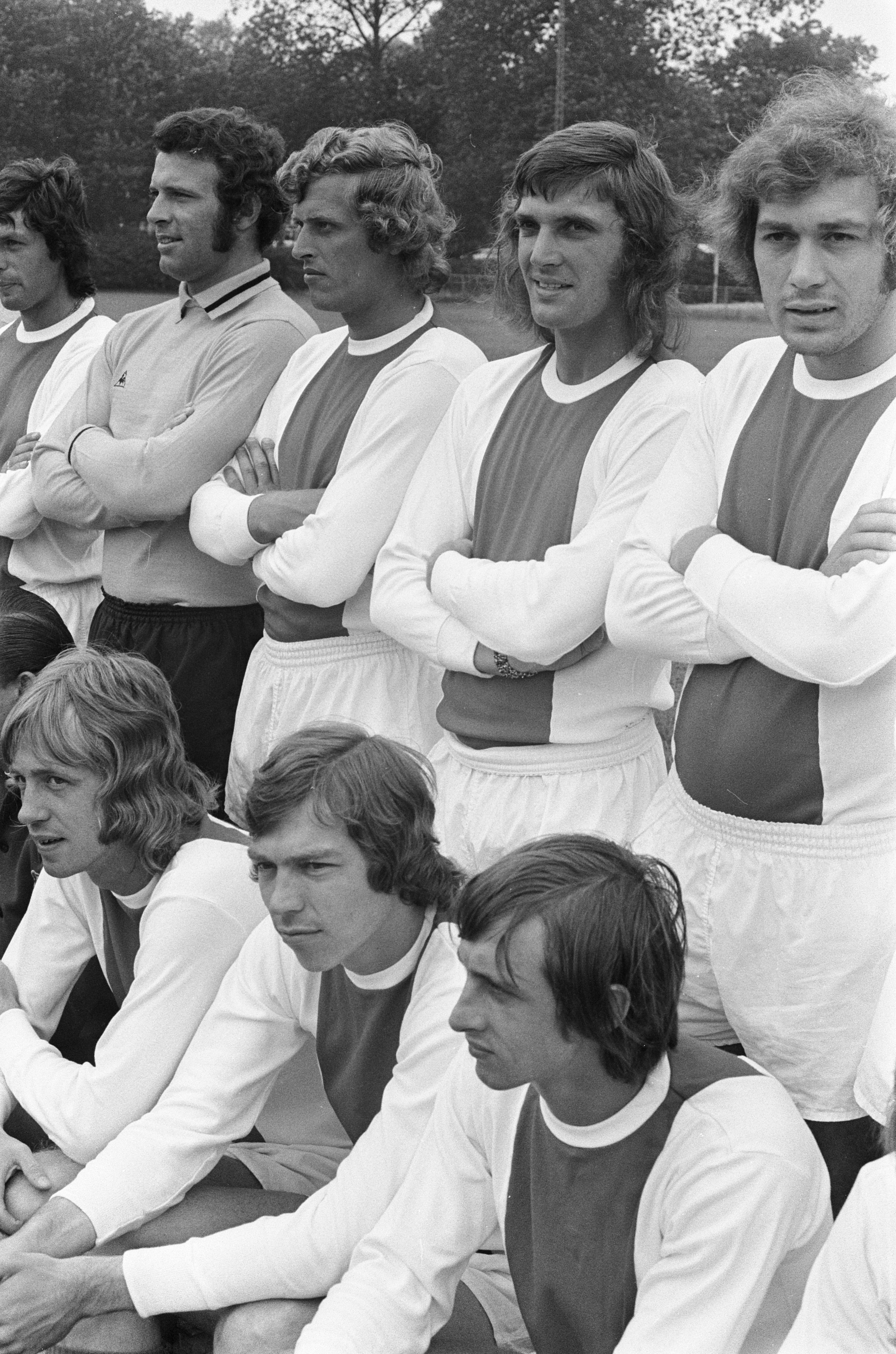 Collectie / Archief : Fotocollectie Anefo Reportage / Serie : [ onbekend ] Beschrijving : Ajax-selectie presenteert zich aan de pers, staand v.l.n. Suurbier, Stuy, Keizer, Krol en Schilcher, zittend v.l.n.r Kleton, Mulder en Cruijff en [tekst afgebroken] Datum : 17 juli 1972 Trefwoorden : sport, voetbal Persoonsnaam : Cruijff, Johan, Keizer, Piet, Kleton, Gerry, Krol, Ruud, Mulder, Jan, Schilcher, Heinz, Stuy, Heinz, Suurbier, Wim Fotograaf : Verhoeff, Bert / Anefo Auteursrechthebbende : Nationaal Archief Materiaalsoort : Negatief (zwart/wit) Nummer archiefinventaris : bekijk toegang 2.24.01.05 Bestanddeelnummer : 925-7435